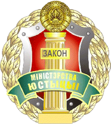 Геральдычны знак Міністэрства юстыцыі